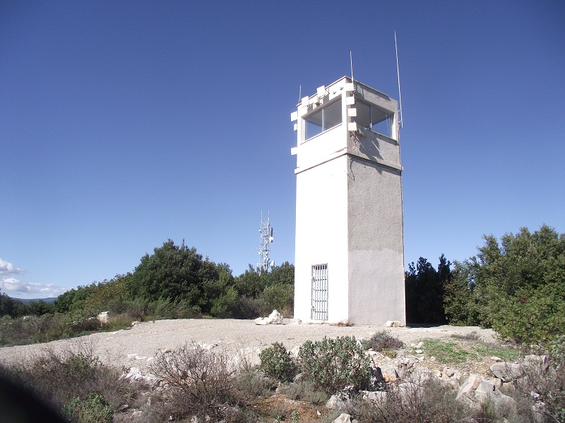 Tour d'observation Malmont (Draguignan, Var, France)